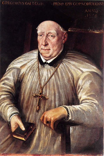 Retrato del prelado español Gregorio Antonio Gallo de Andrade (1512-1579), que fue el primer obispo de la diócesis de Orihuela y posteriormente obispo de Segovia. Falleció en 1579 y fue sepultado en la capilla de San Gregorio del desaparecido convento de San Pablo de Burgos.